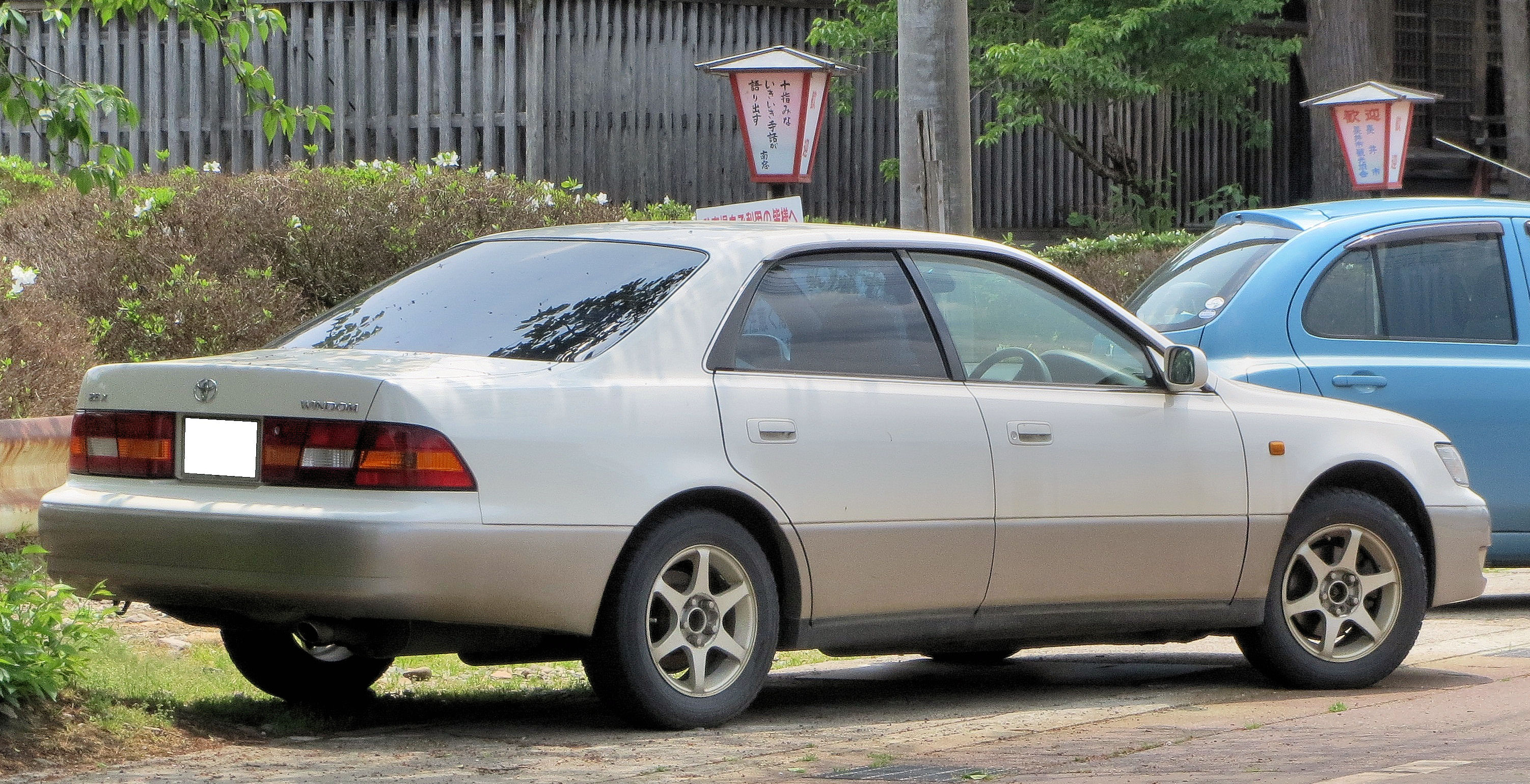 トヨタウインダム(２代目)